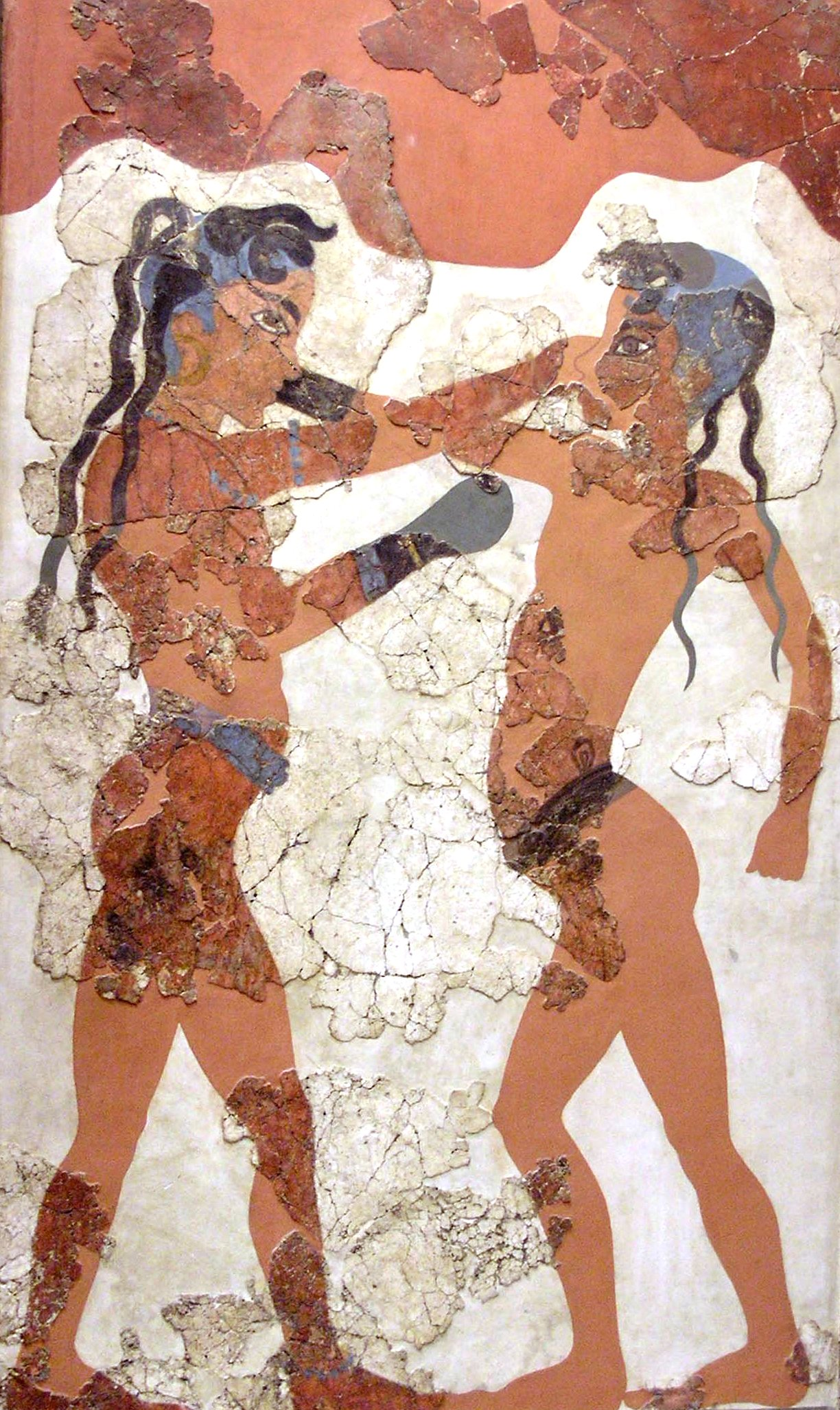 Fresque des enfants boxeurs. La fresque dépeint deux enfants nus portant une ceinture et des gants de boxe. Leur tête est rasée sauf pour deux longues mèches derrière, et deux plus courtes sur le front. Leur peau foncée indique leur sexe. Le garçon de gauche est le plus réservé des deux et porte des bijoux (bracelets, collier) qui indiquent un statut social plus élevé. Œuvre du même artiste que la fresque des Antilopes. Pièce B1, édifice B à Akrotiri.